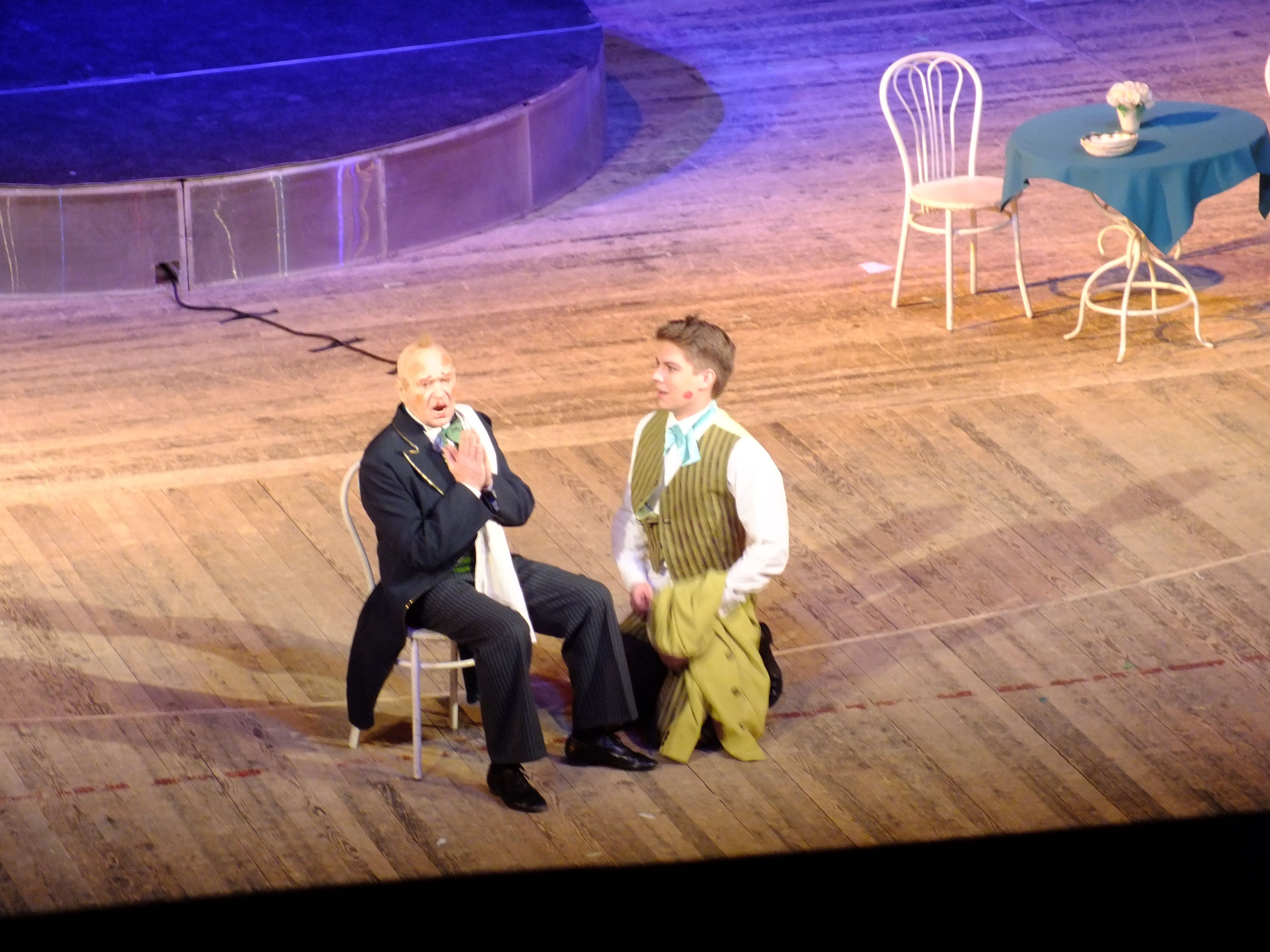 Хабаровский краевой музыкальный театр